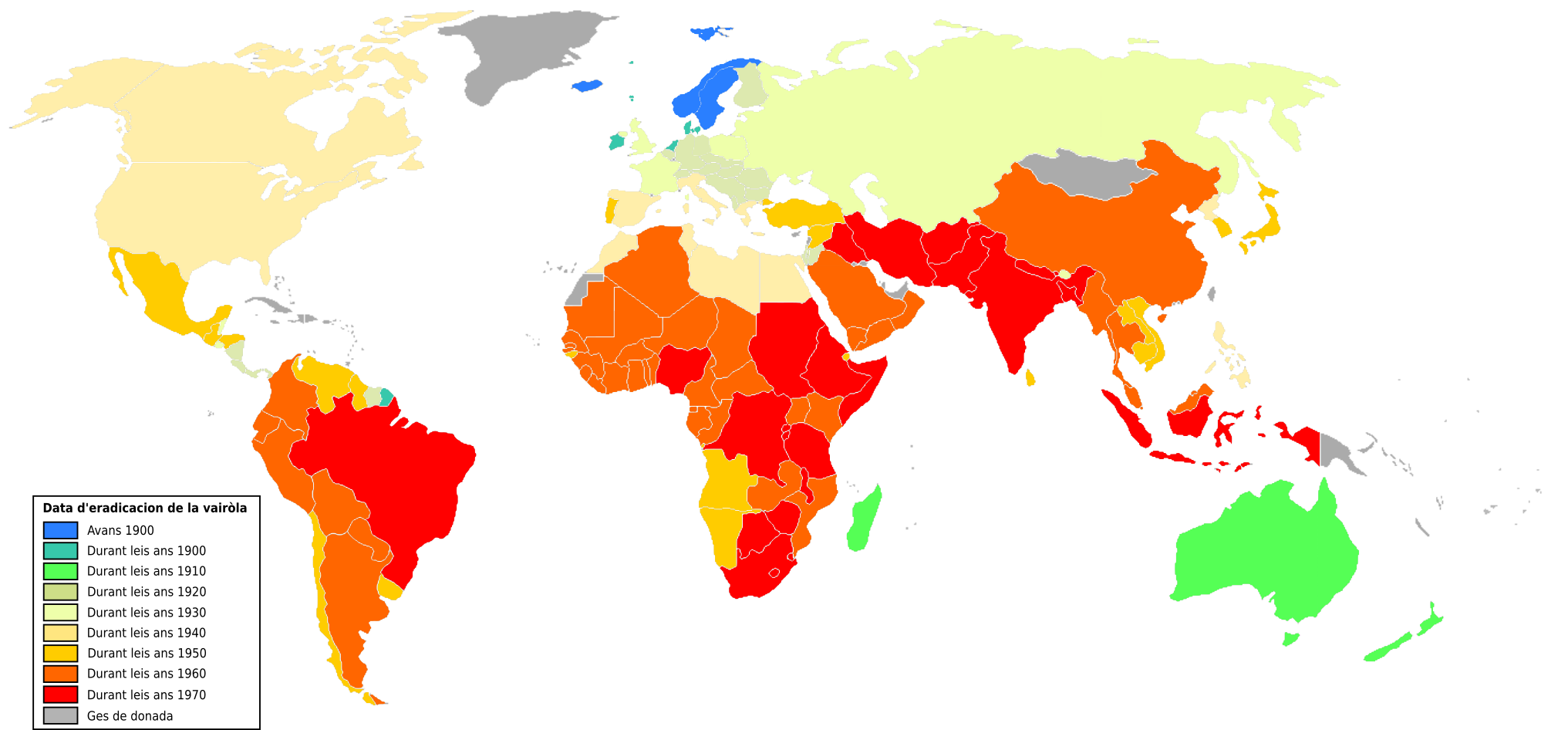 Periòde d'eradicacion de la vairòla dins lo mond